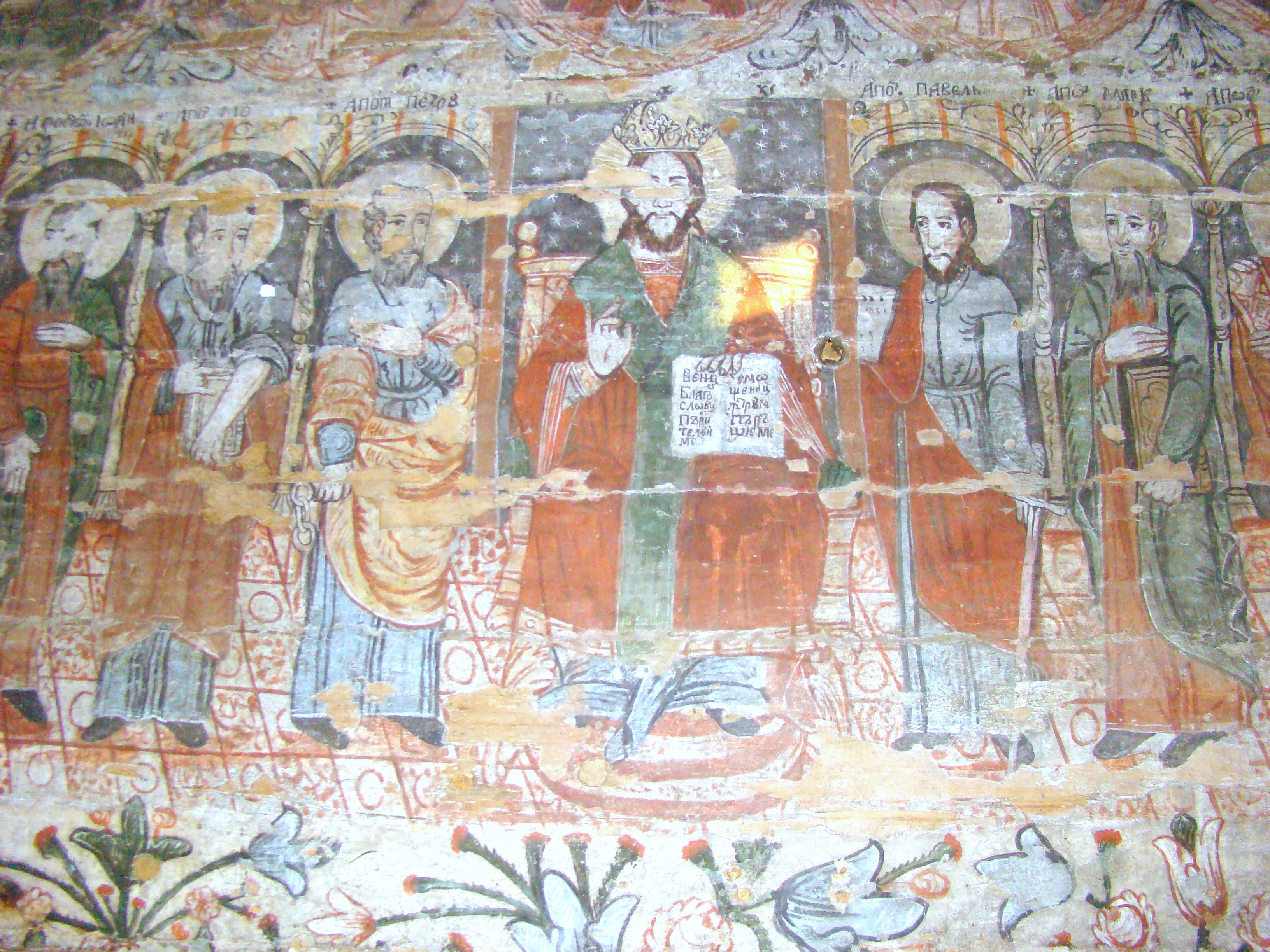 Biserica de lemn din Racâș, județul Sălaj